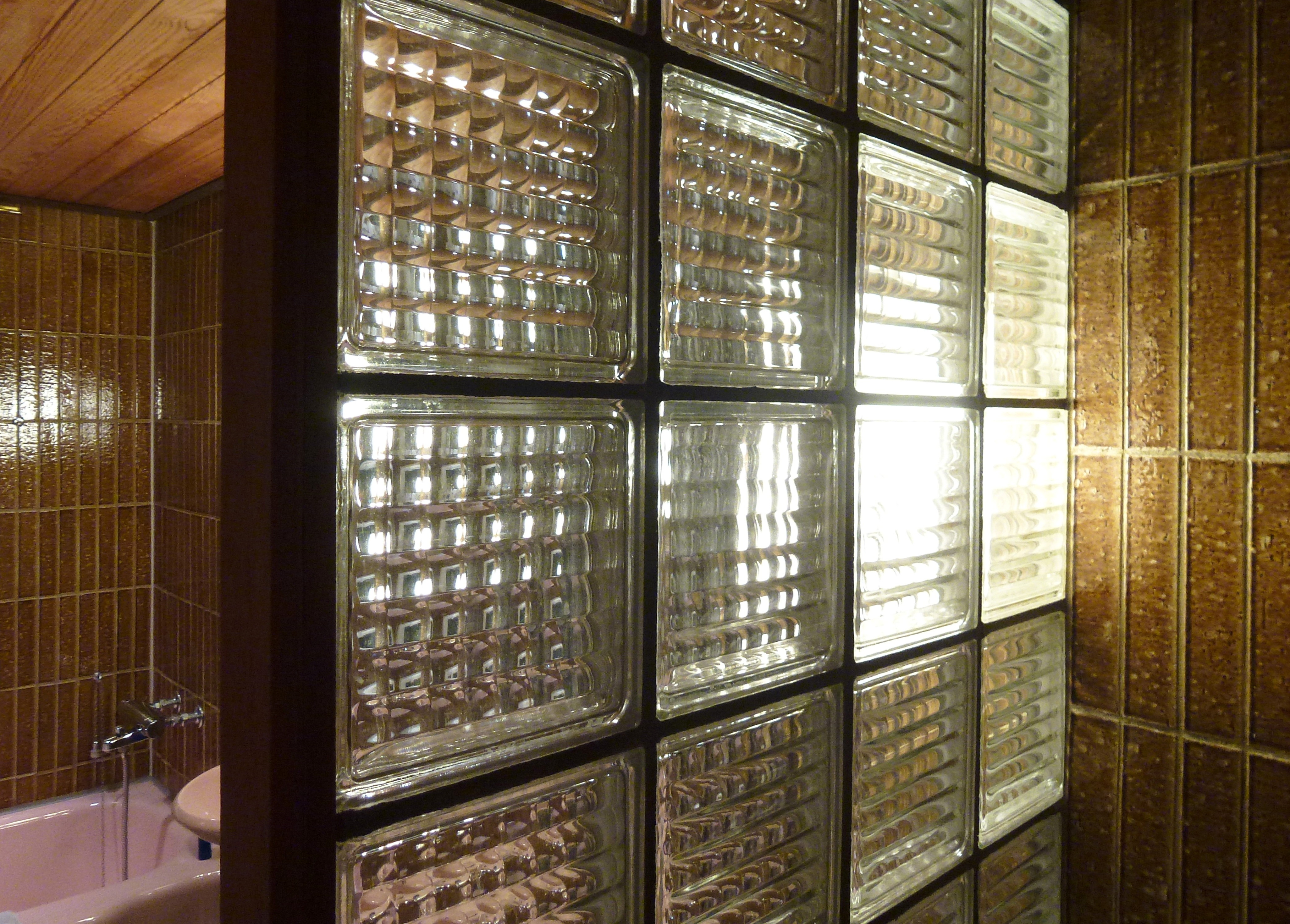 Glasblock som skärmvägg på en villa i Stockholm